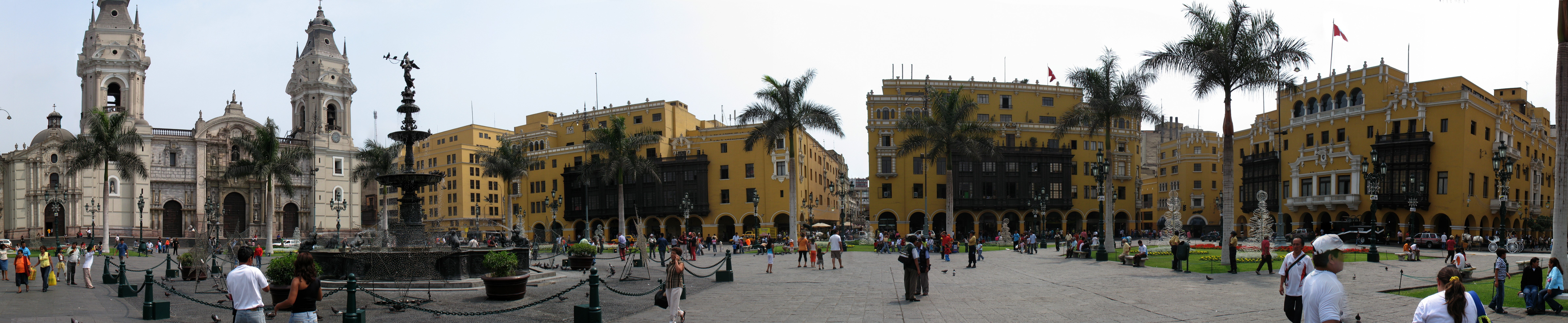 Detalle imagen 360° Panorama Plaza Mayor, Lima, Peru.jpg